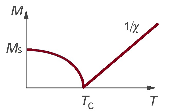 temperature de curie